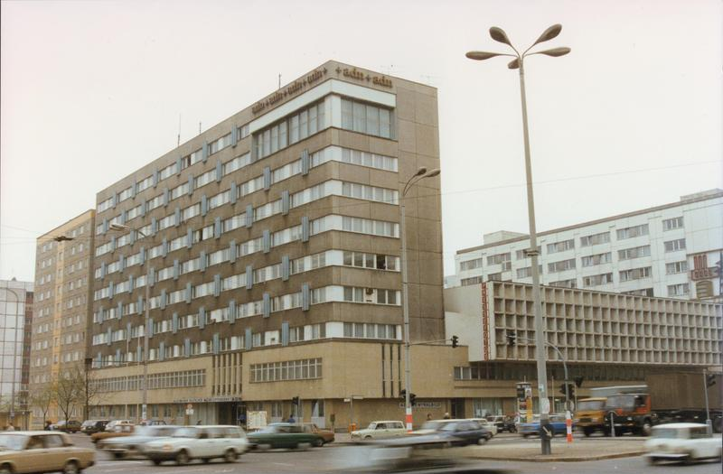 ADN-ZB/ 10.8.1990 Berlin: Das Gebäude des Allgemeinen Deutschen Nachrichtendienstes (ADN) in der Mollstraße/Ecke Karl-Liebknecht-Straße im Stadtbezirk Mitte.